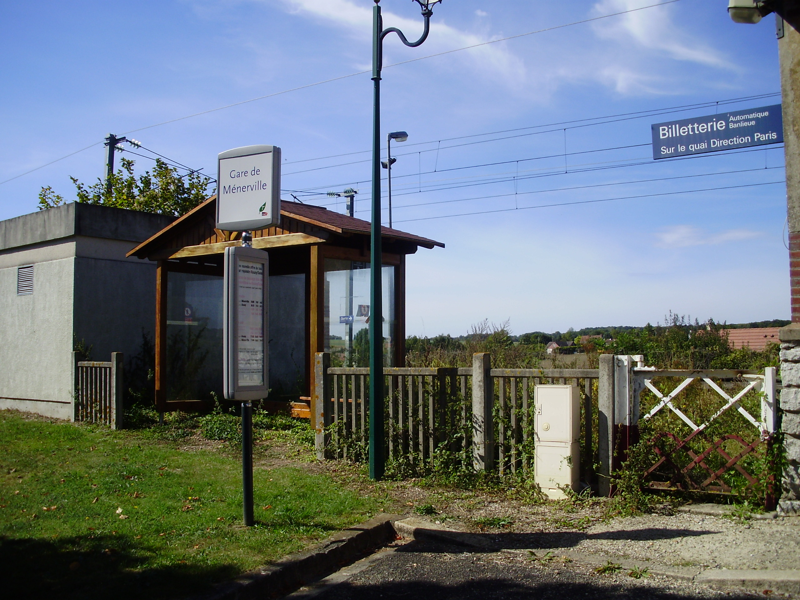 Gare de Ménerville, Yvelines, France (poteau de l'arrêt du bus Transilien et son aubette)